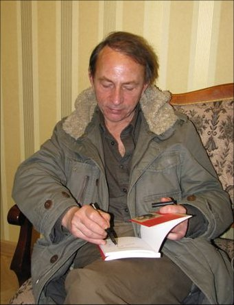 Michel Houellebecq (b. 1958), French writer